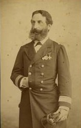 Erwin Antonín Anna Dubský (1836 - 1909), Český námořní kapitán a cestovatel.